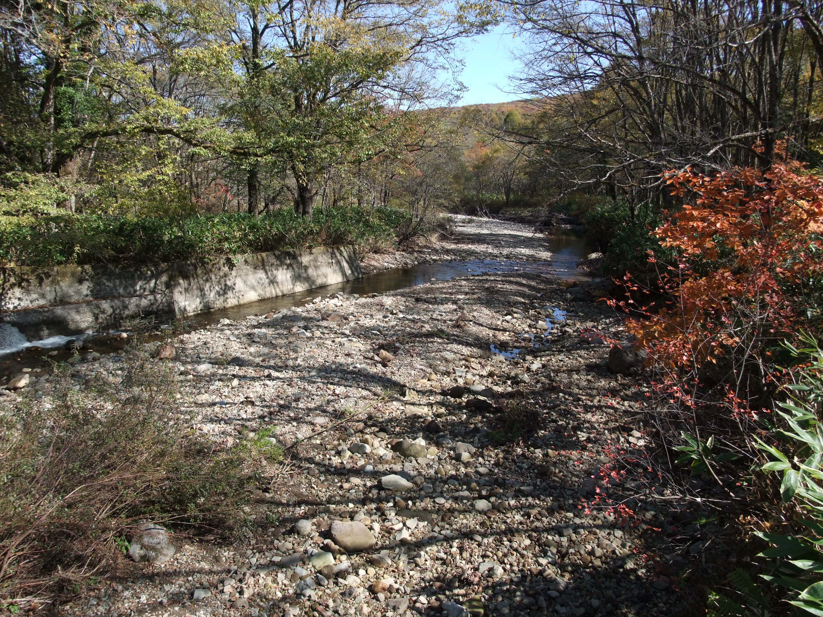 鳥居川上流。長野県長野市・信濃町境大橋地籍付近